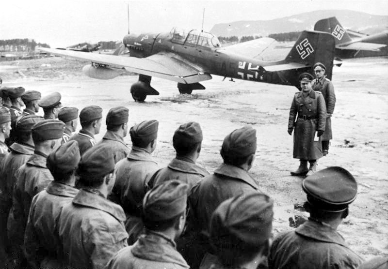 Title: Norwegen, Erhard Milch bei Stuka-Staffel Extra information: Norwegen, Drontheim.- Generaloberst Erhard Milch vor angetretenen Soldaten der Luftwaffe (I. Gruppe, Sturzkampfgeschwader 1); im Hintergrund Flugzeug Junkers Ju 87R; Foto: Propagandakompanie Staffel Nord People in the image: Milch, Erhard: Generalfeldmarschall, Ritterkreuz (RK), Luftwaffe, Deutschland (GND 118582402) Factual corrections and alternative descriptions are encouraged separately from the original description. Additionally errors can be reported at this page to inform the Bundesarchiv. Original historic description: Heeresfilmstelle. Bildarchiv: Generaloberst Milch begrüsst in Drontheim die tapfere Mannschaft einer Stuka-Staffel. Norwegen, Drontheim; 23.4.40